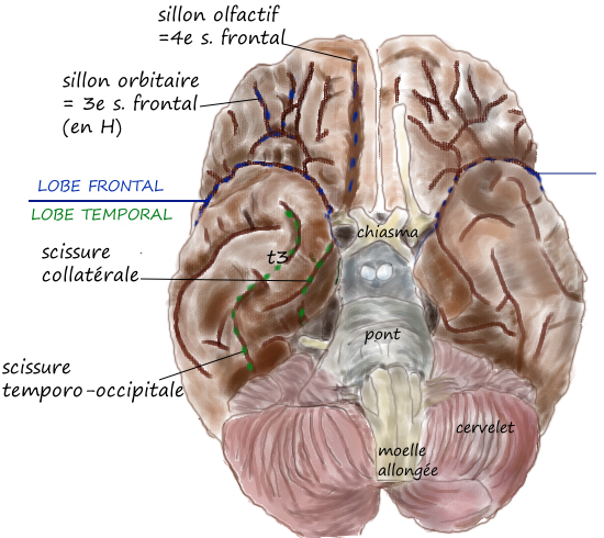 Face ventrale du cerveau, sillons. Dessin à la main (Artweaver) d'après une pièce anatomique de Digital Anatomist